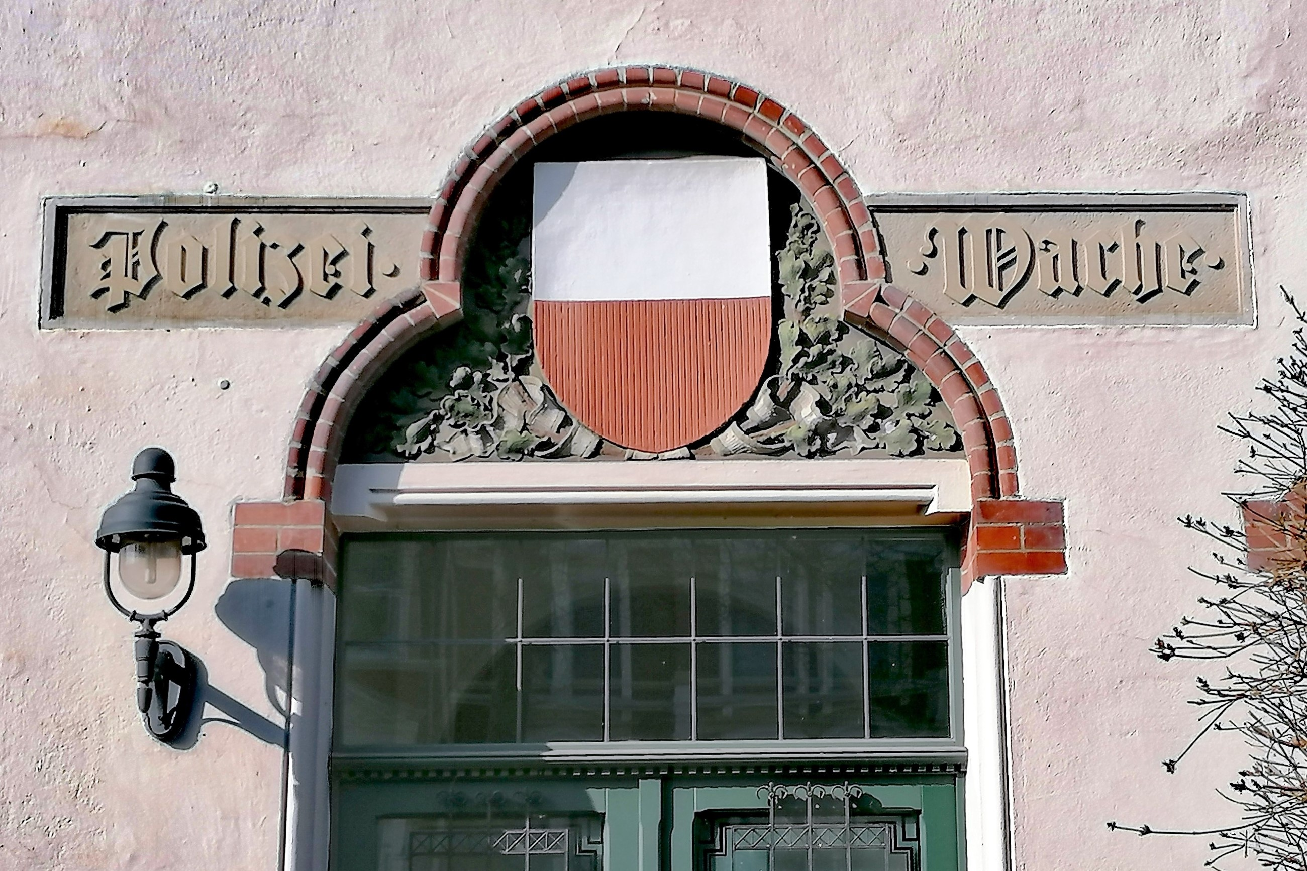 Das Anwachsen der Vorstadt St. Lorenz hatte den Bau einer Feuerwache daselbst notwendig gemacht, die am 13. Januar dem Betrieb übergeben wurde. Einige Wochen später wurde auch die daneben liegende Polizeiwache für die Benutzung fertiggestellt.